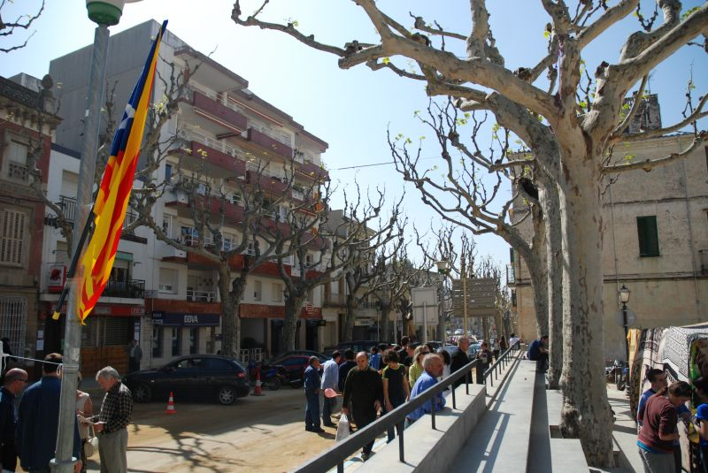 La Riera, vista des de la plaça de l'església.